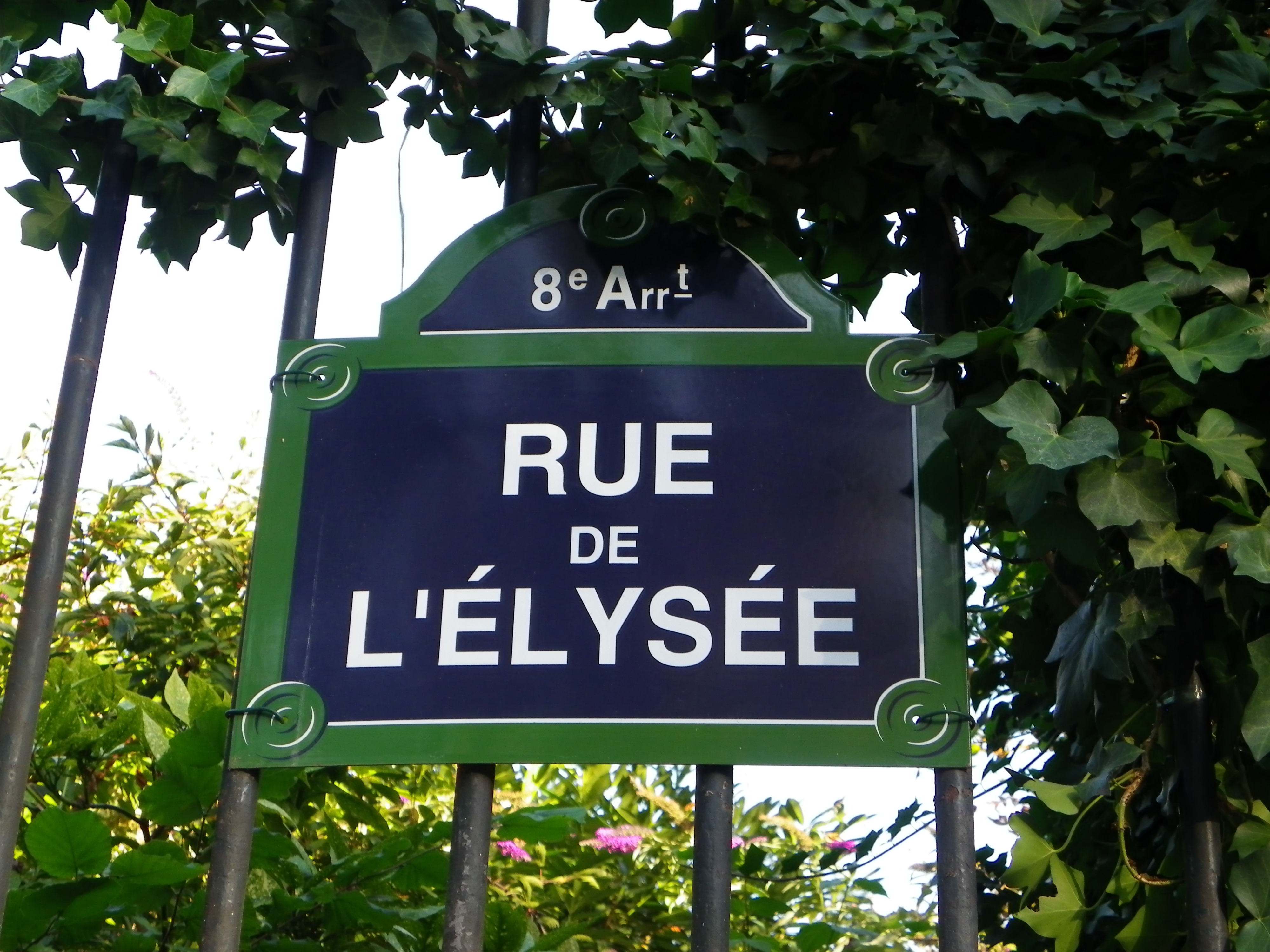 Plaque rue de l'Elysée à Paris